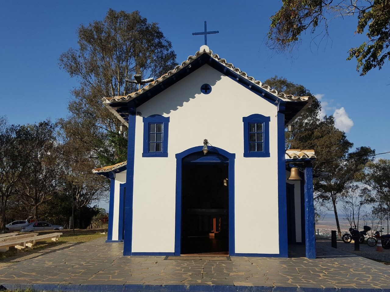 Capela na Serra de Santa Helena - Sete Lagoas Foto: Cortesia do Gernan.